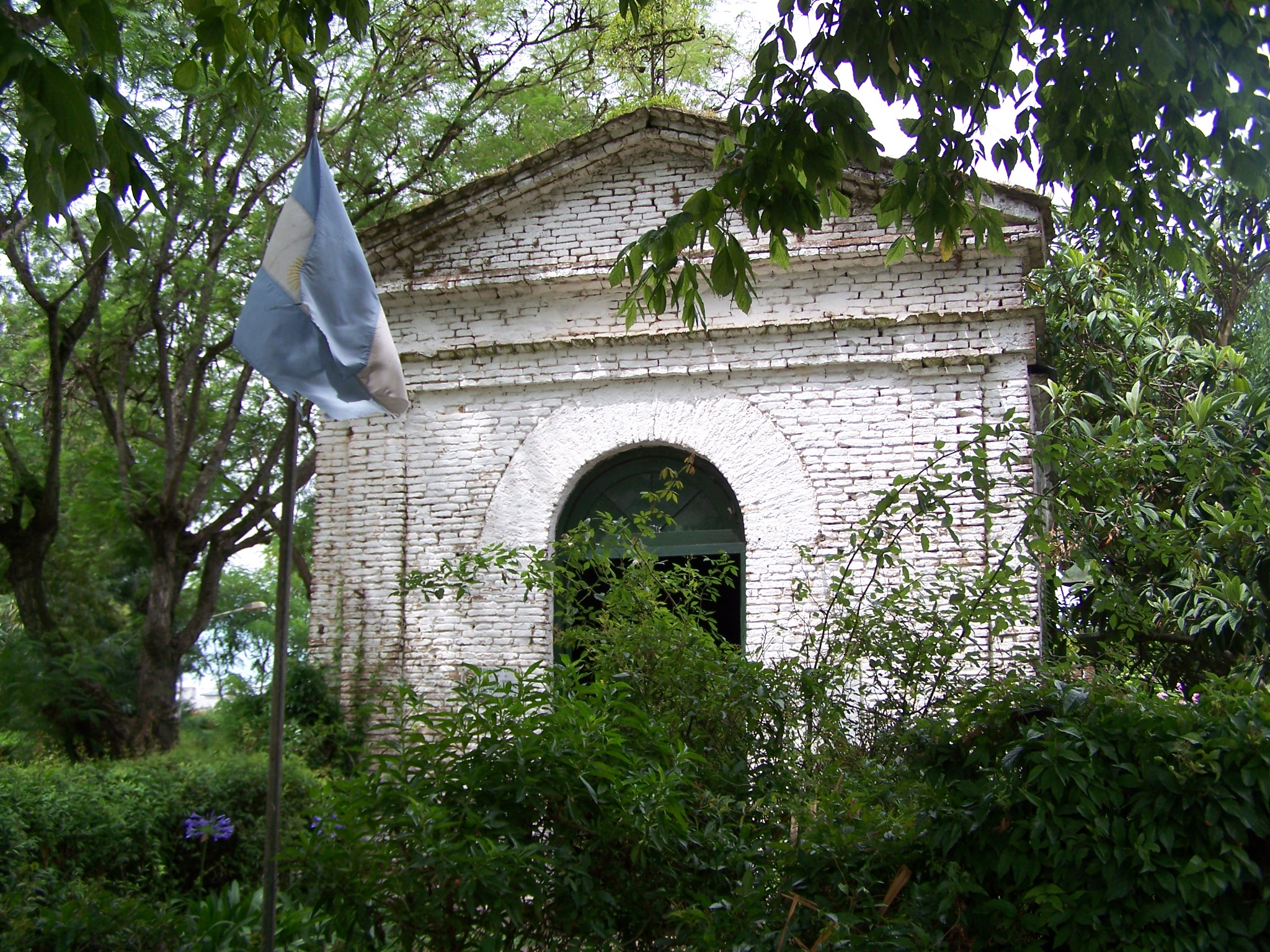 Capilla de los Negros en Chascomús.